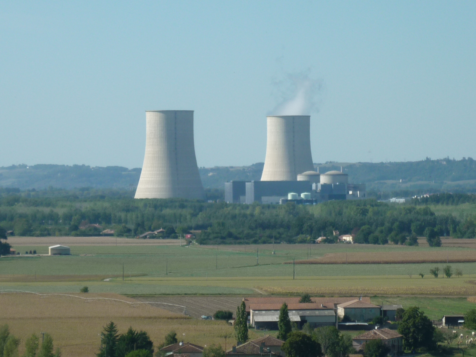 Centrale électro-nucléaire de Golfech vue d'Auvillar